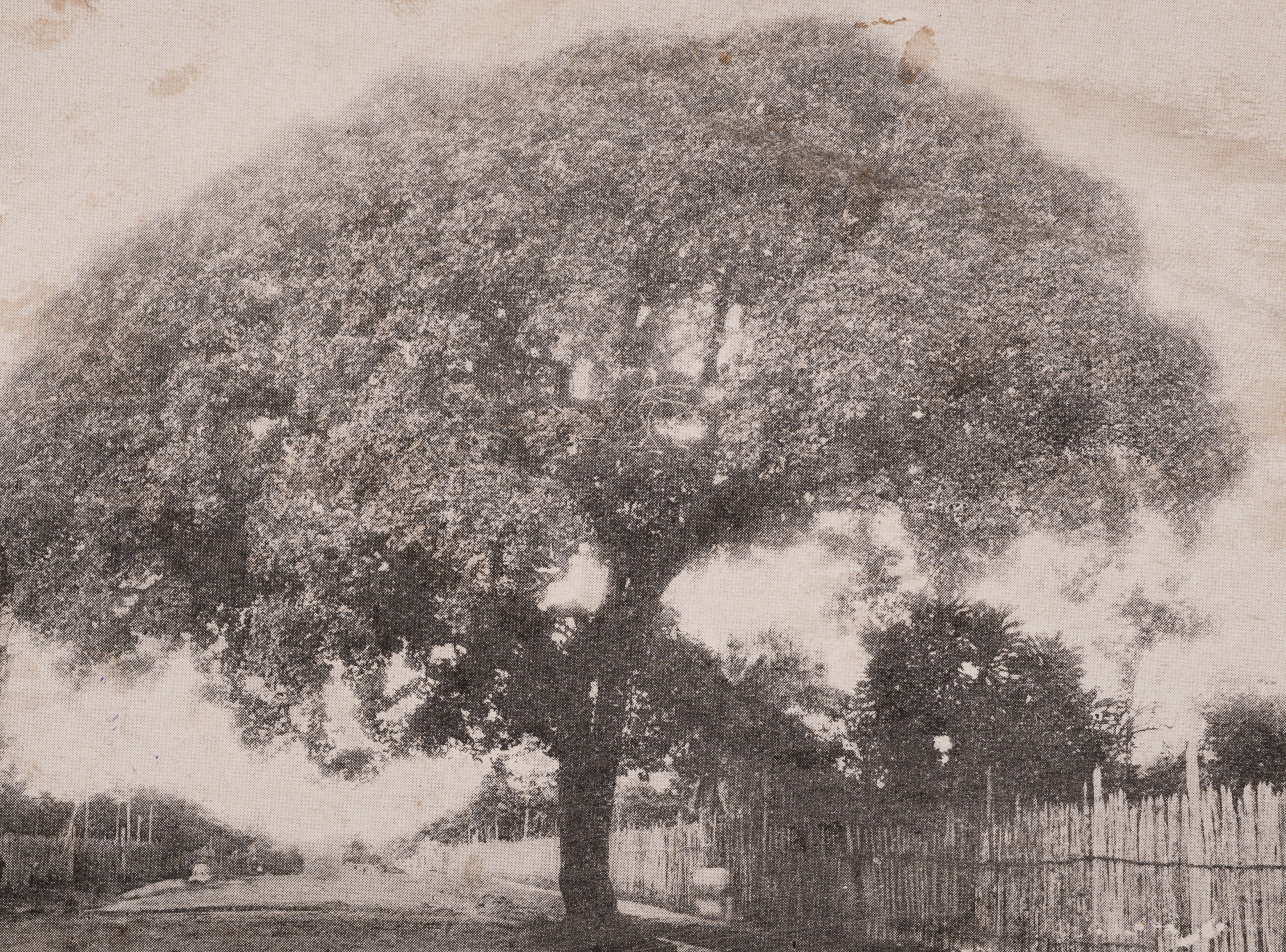 Obra que integra o acervo do Museu Paulista da USP. Coleção João Baptista de Campos Aguirra.